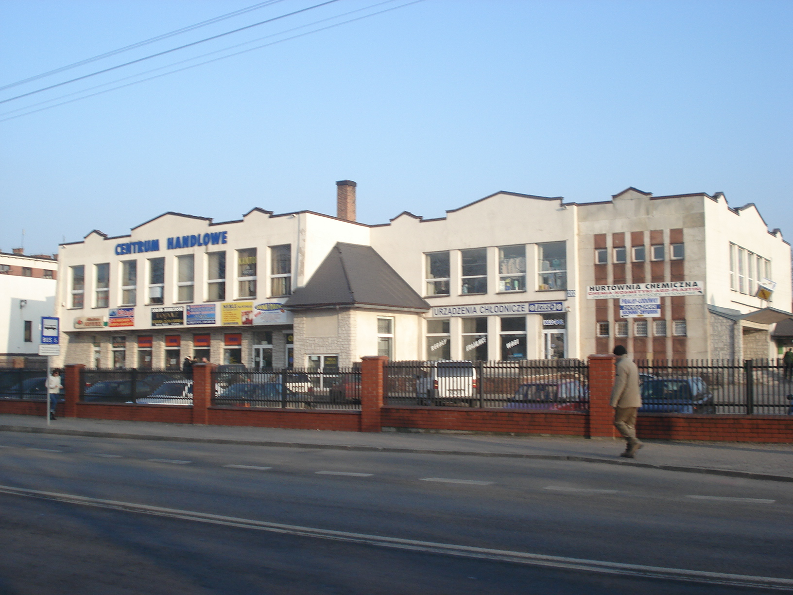 Budynek Domu Handlowego w Szydłowcu.